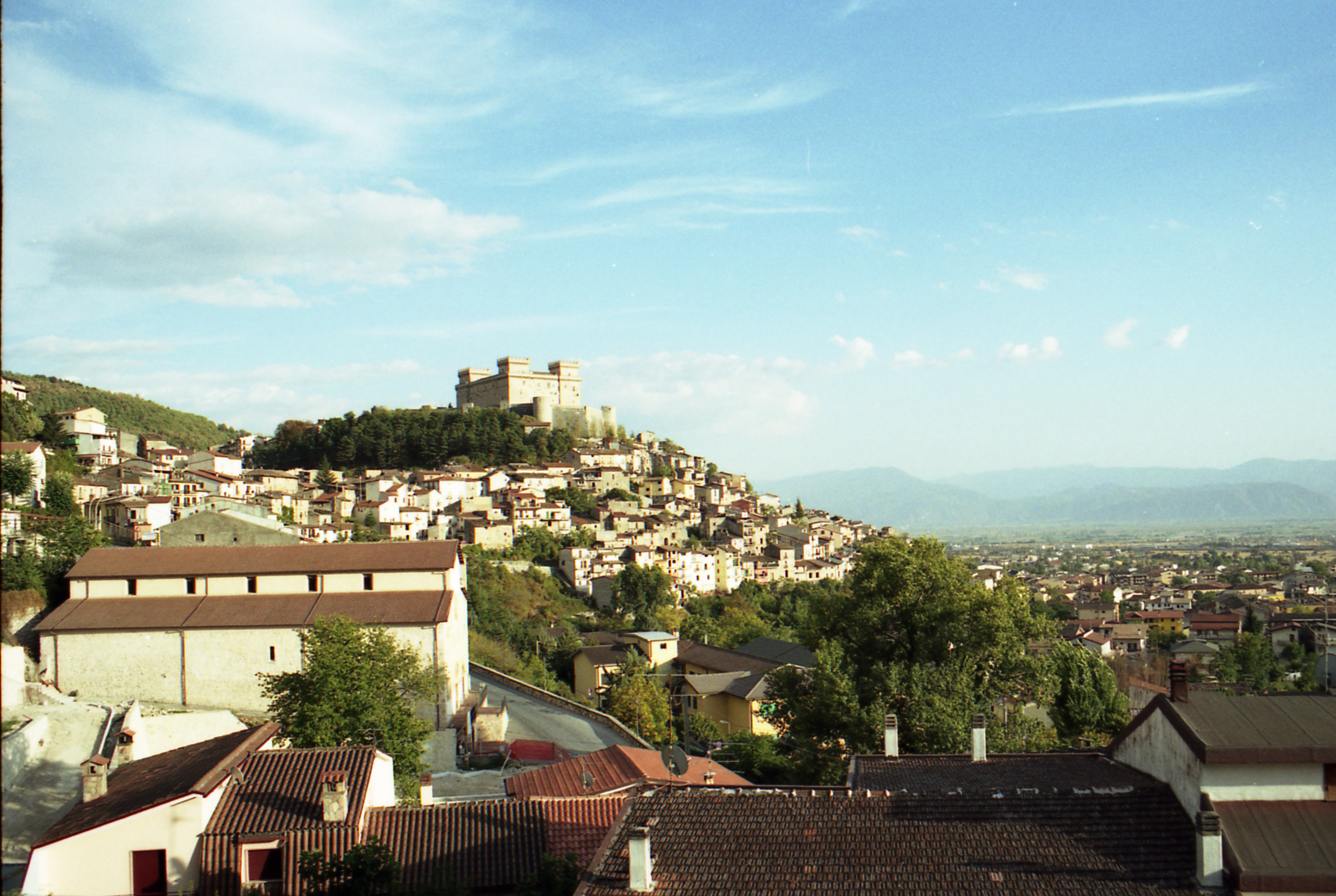 L'abitato di Celano con il Castello Piccolomini